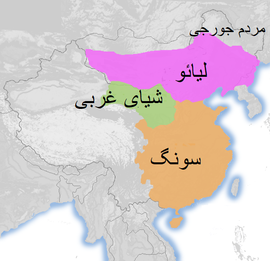 نقشه دودمان لیائو و دودمان سونگ و شیای غربی در سال 1111 میلادی